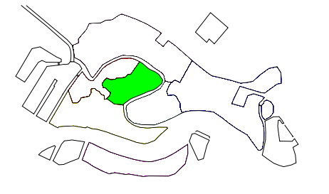 Sestiere di San Polo a Venezia